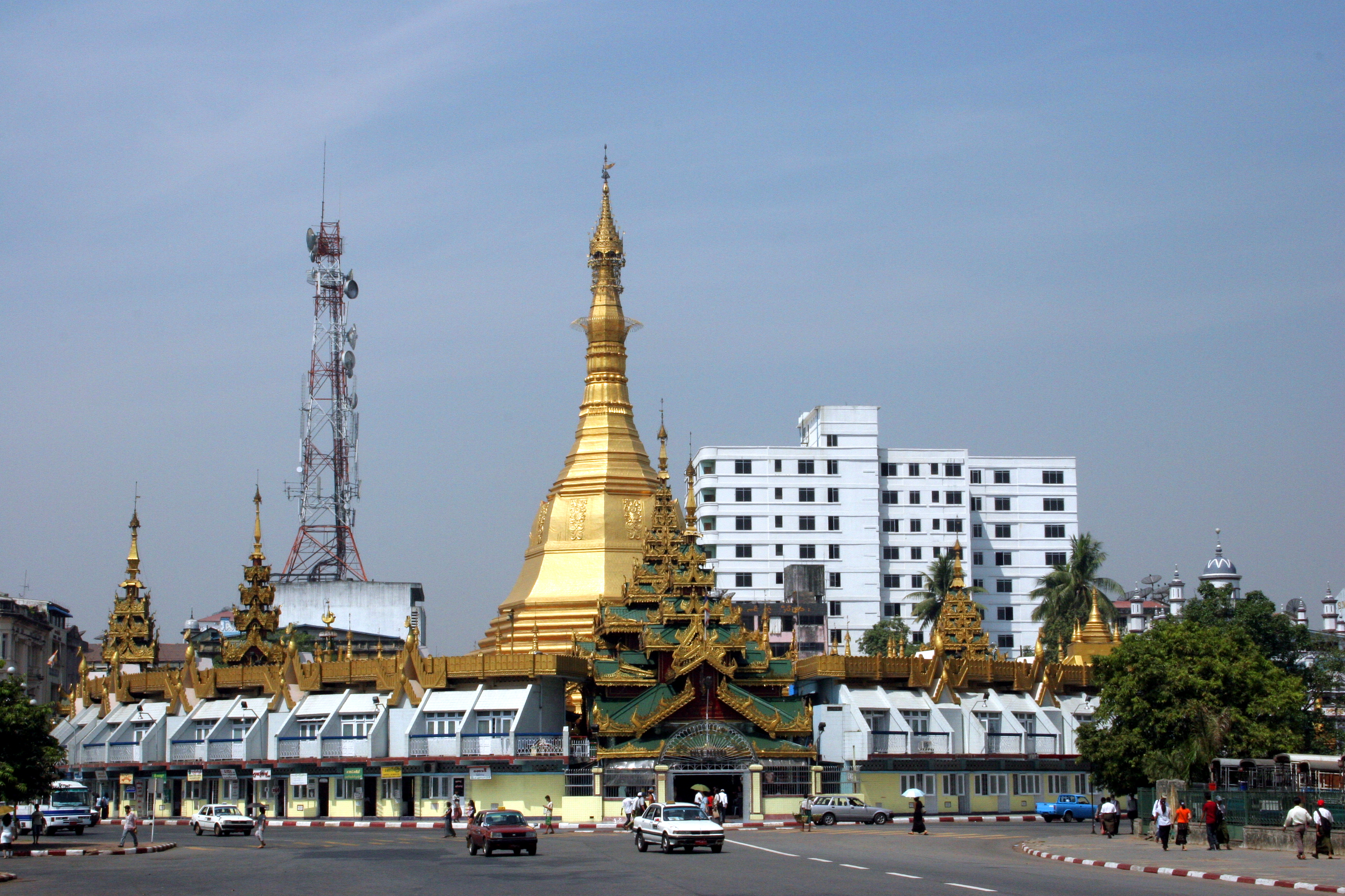 Sule Pagoda in Yangon, Burma